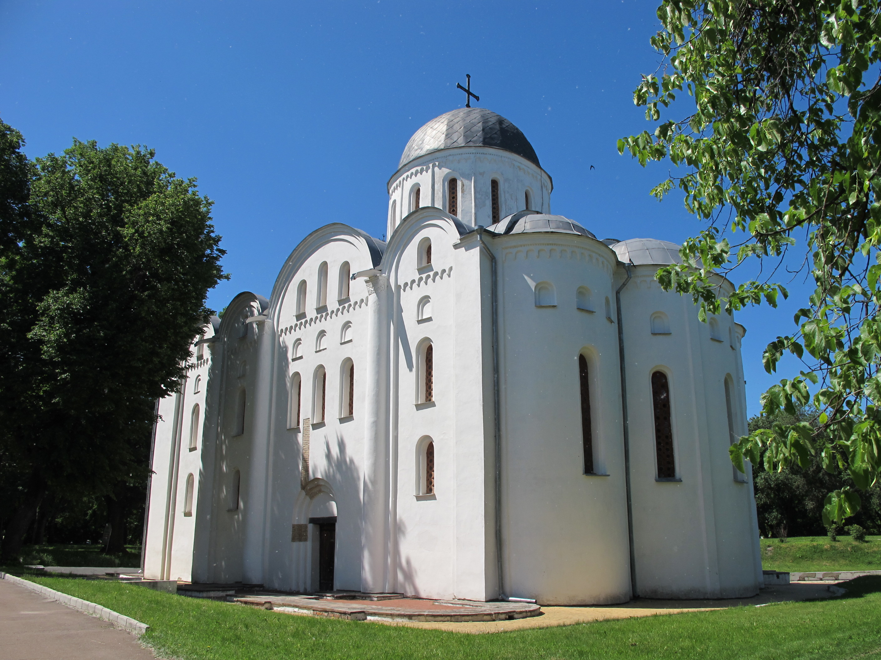 Борисоглебский собор в Чернигове